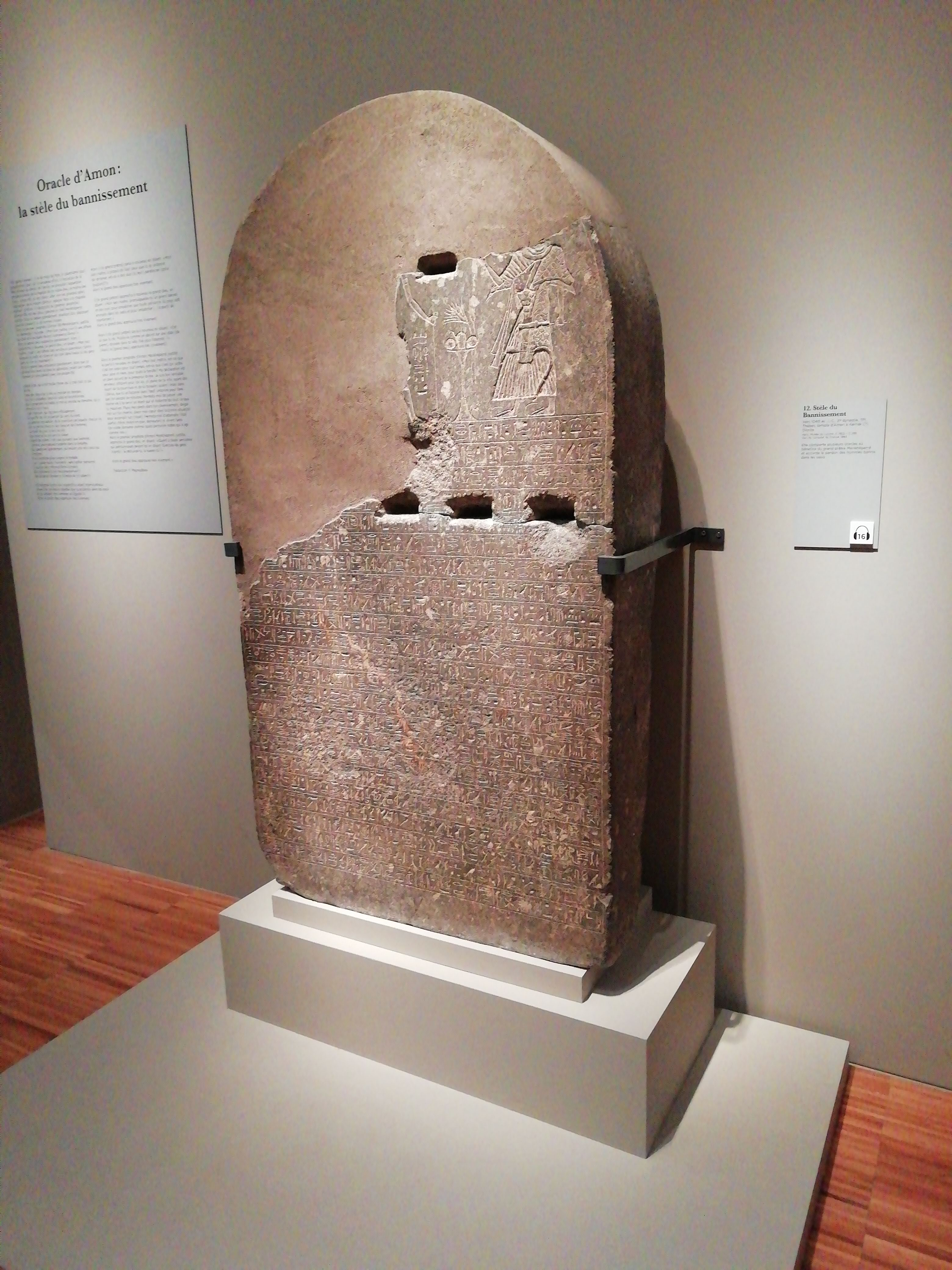 Stèle du banissement accordant le pardon aux hommes bannis dans les oasis, (1040 av. J-C), Thèbes (Karnak ?), diorite, collection musée du Louvre - Servir les dieux d'Égypte du 25 octobre 2018 au 27 janvier 2019 - Musée de Grenoble.